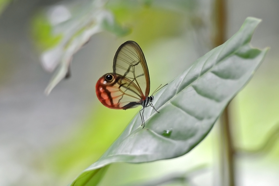 Nymphalidae: Cithaerias pireta pireta Isla Colón, Bocas del Toro, Panama